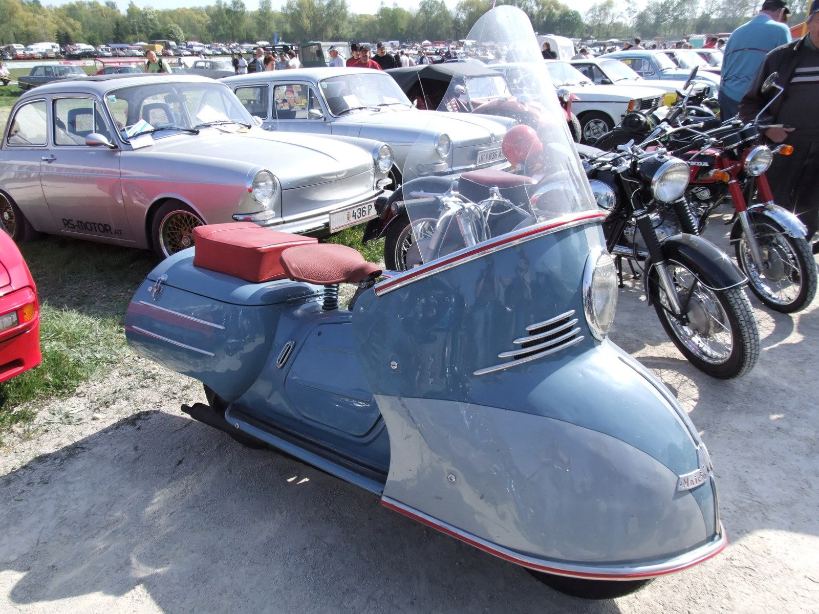 Quelle: selbst fotografiert, 04/2007 Fotograf: Späth Chr.